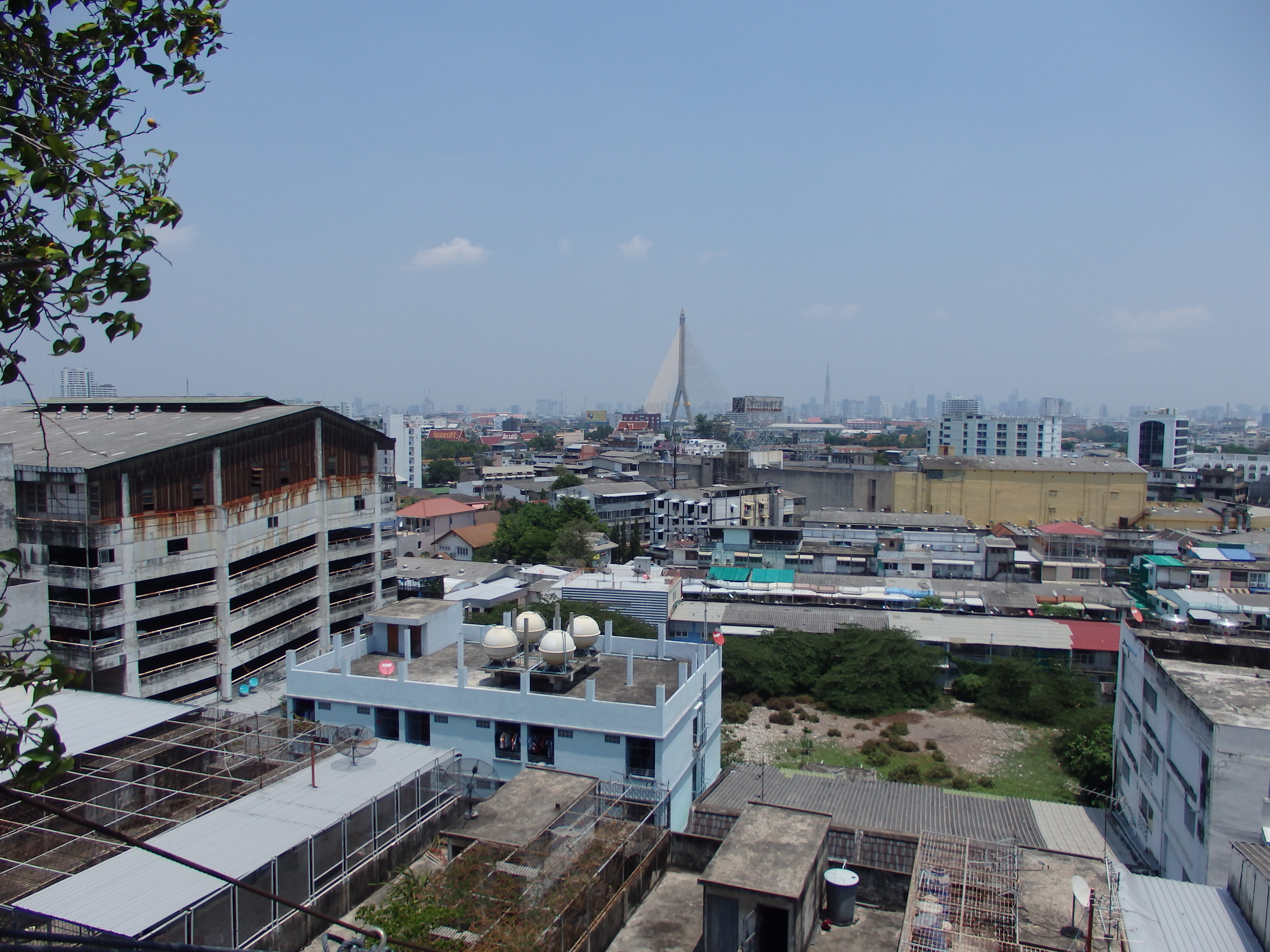 Bang Yi Khan, Bang Phlat, Bangkok 10700, Thailand